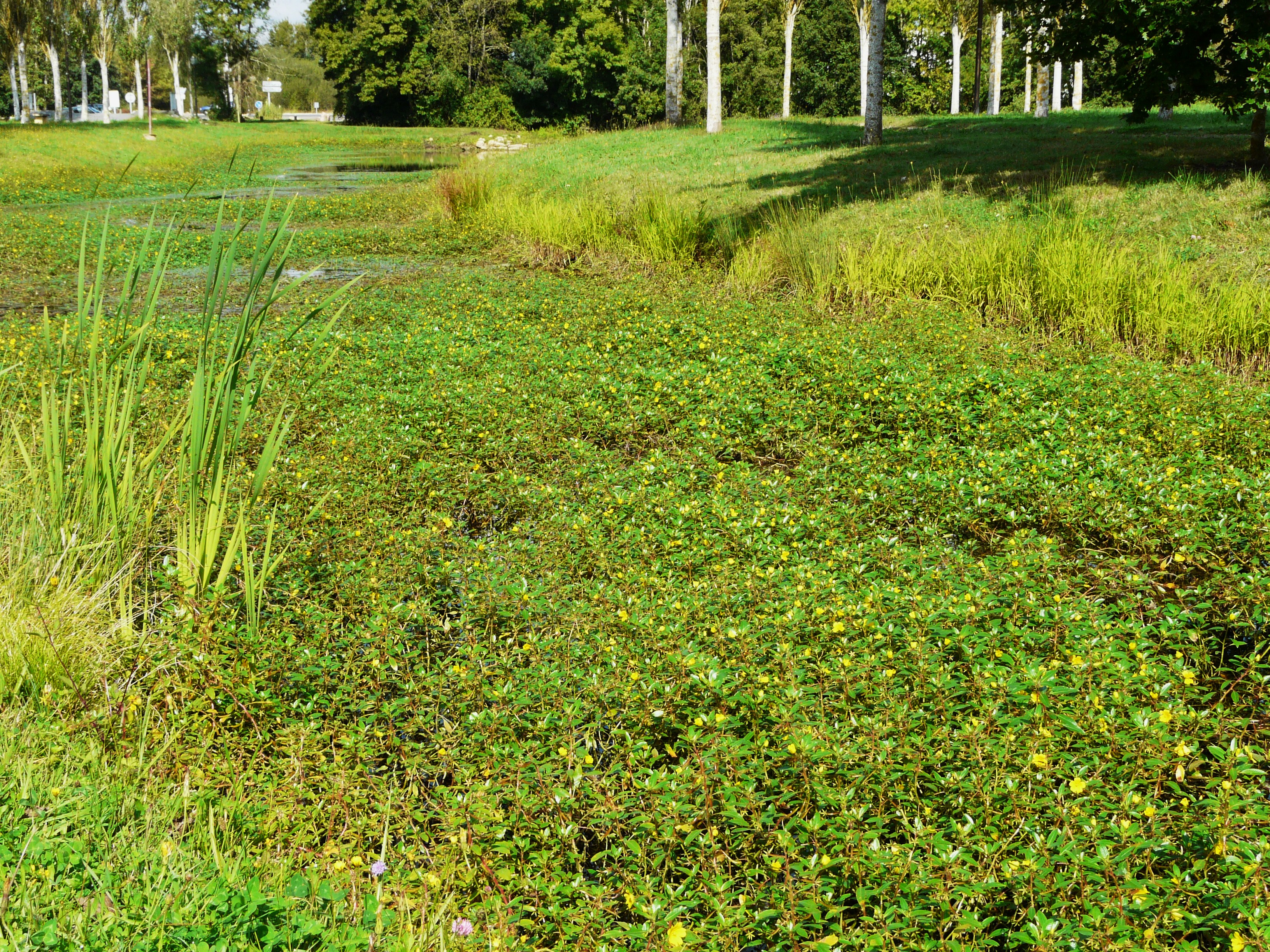 Bras d'eau presque entièrement recouvert de jussie rampante (Ludwigia peploides subsp. montevidensis) ; base de loisirs de Chandos, Montpon-Ménnestérol, Dordogne